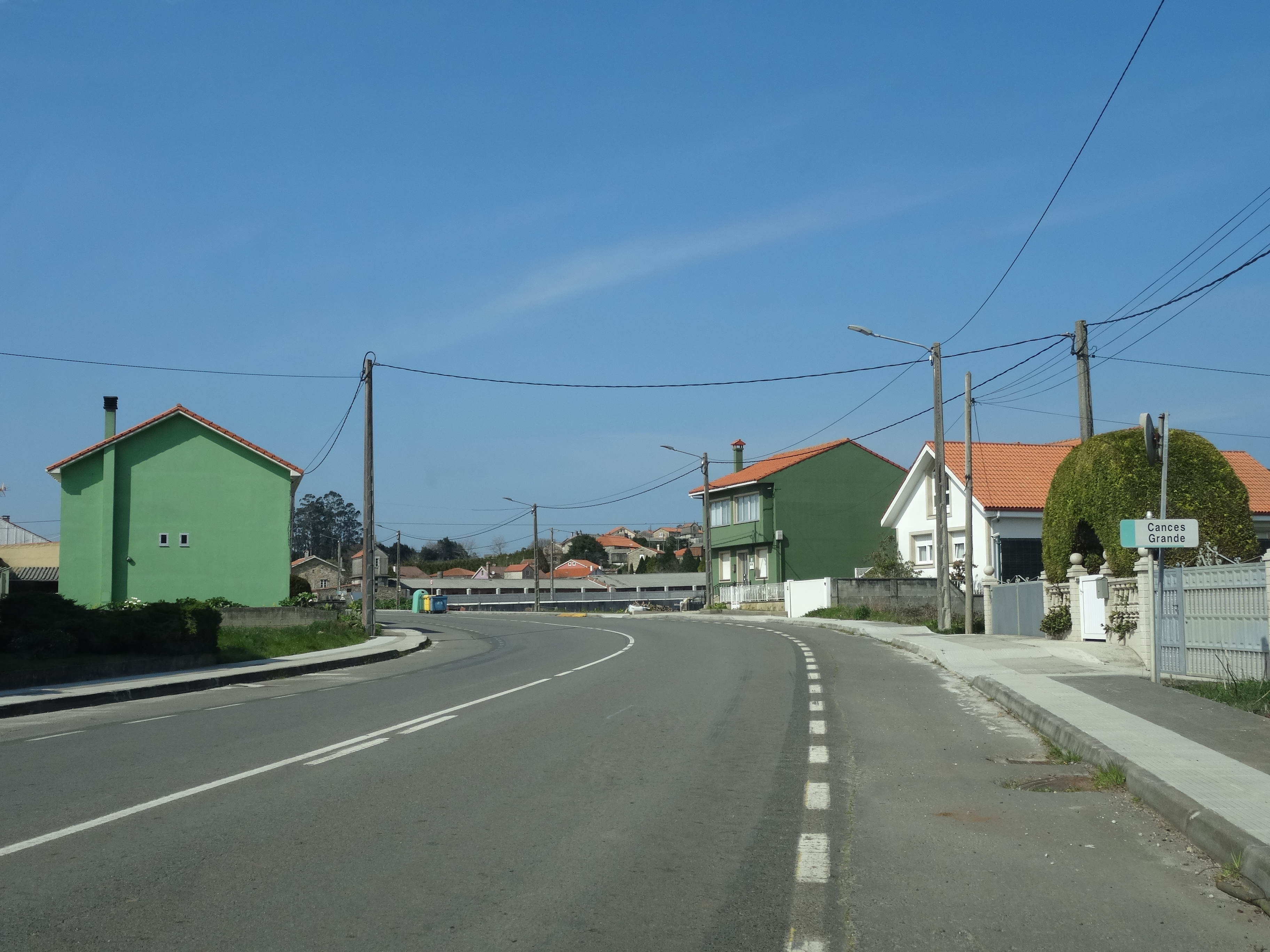 Lugar de Cances Grande na parroquia de Cances, Carballo.